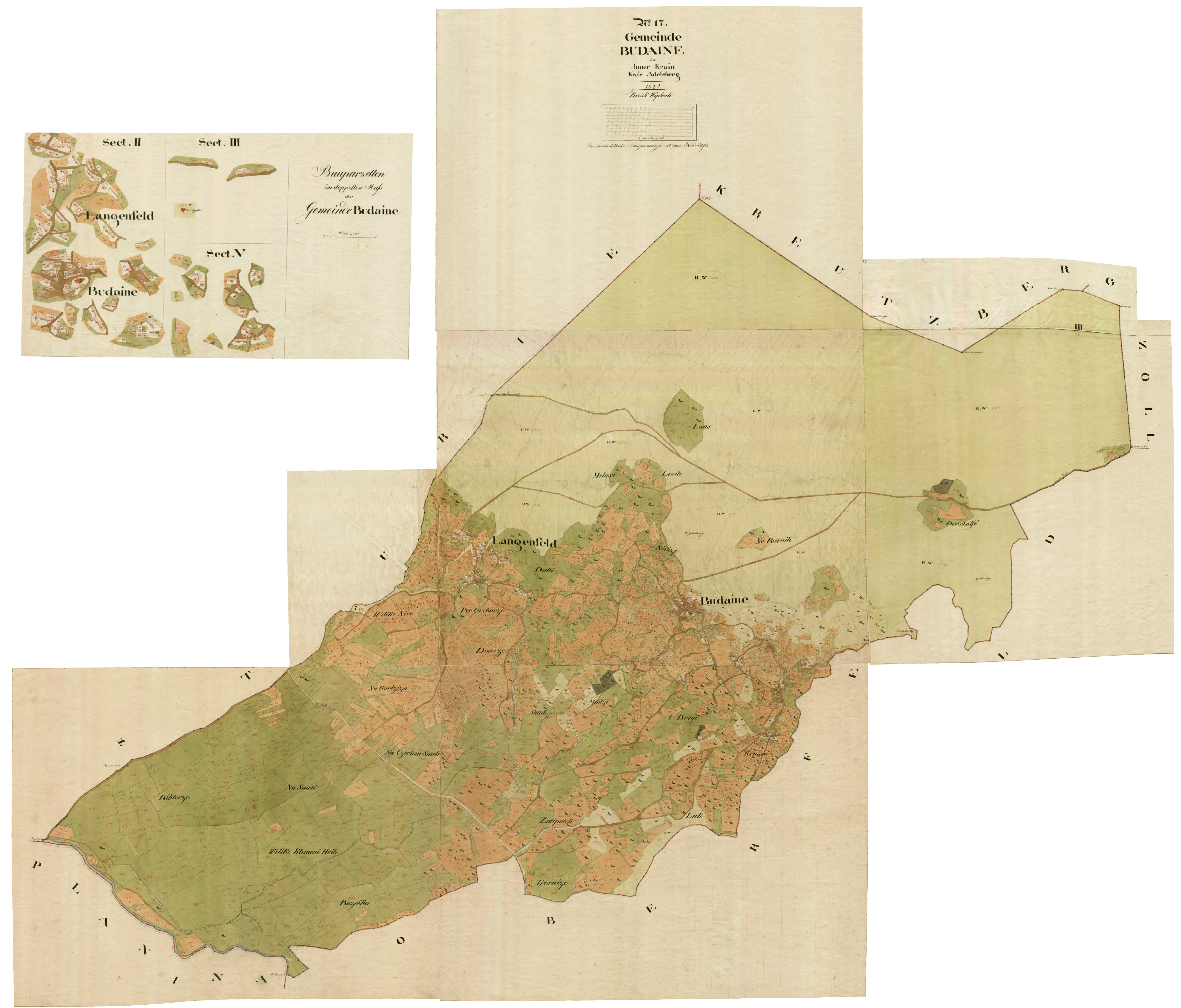 Franciscejski kataster Budanj iz leta 1822.